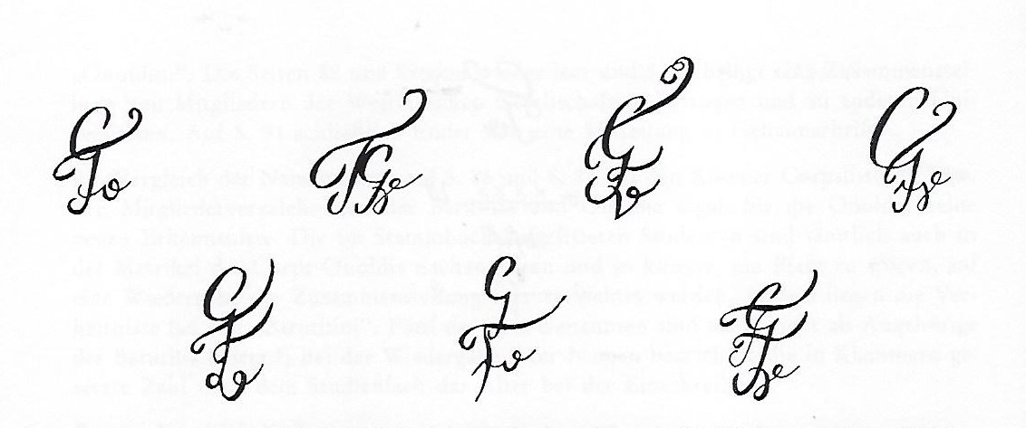 Zirkel der Westfälischen Landsmannschaft in Erlangen (1794–1809).